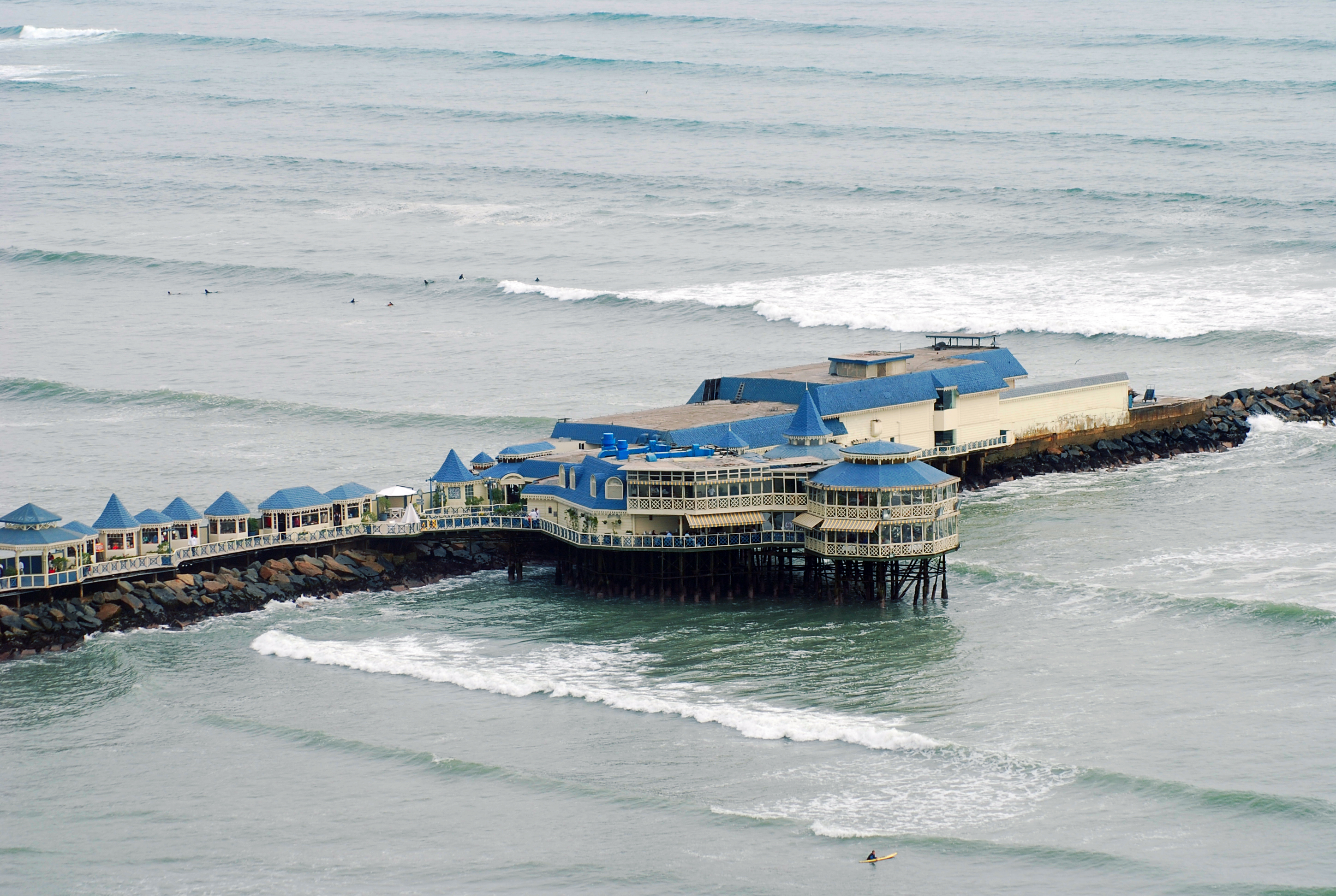 Restaurante Rosa Nautica en Lima, Peru